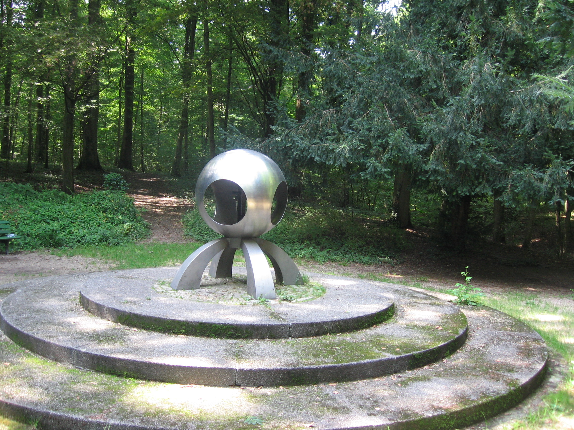 Öffentliche Schwefelquelle Östringen im Krummbachwald